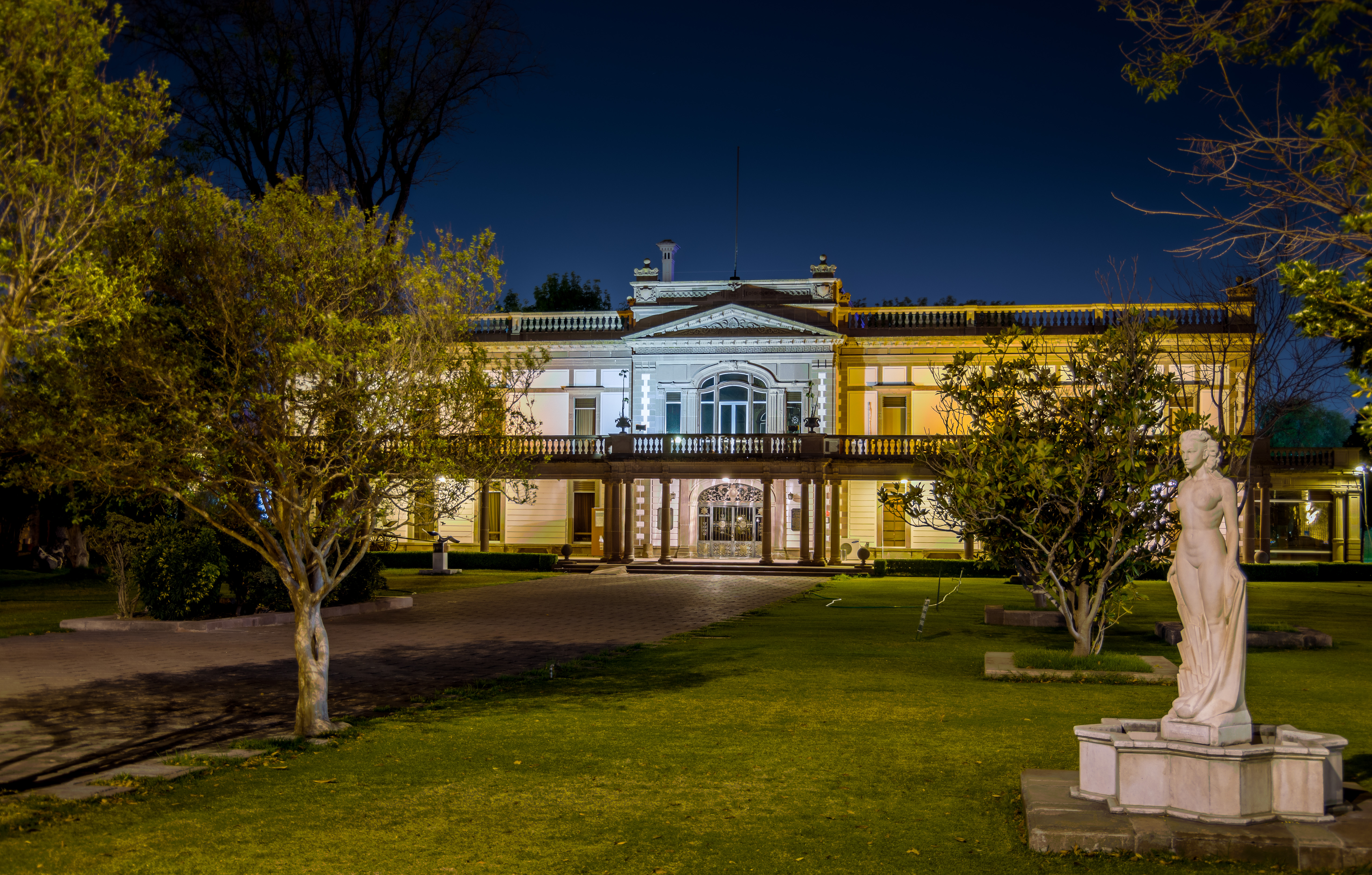 Casa de la Cultura actual museo Francisco Cossío